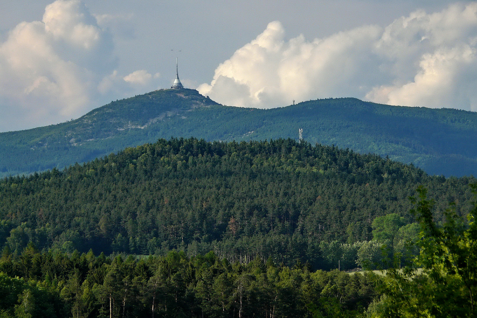 Ještěd, Černý vrch a Jelínka z Hlavice